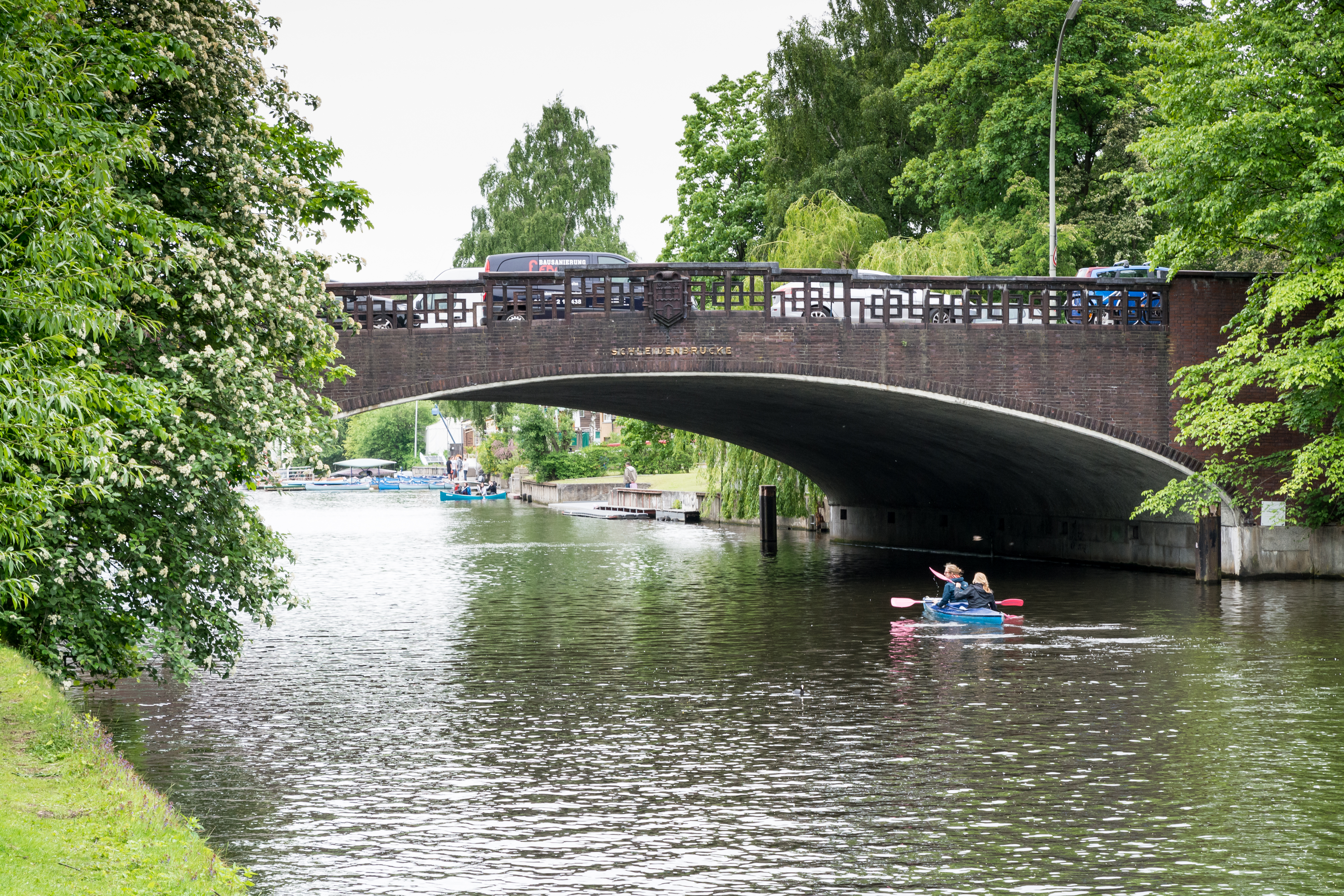 Schleidenbrücke über den Osterbekkanal in Hamburg. Blick von Osten. This is a photograph of an architectural monument. , 22329, 23210, 23211, 24448